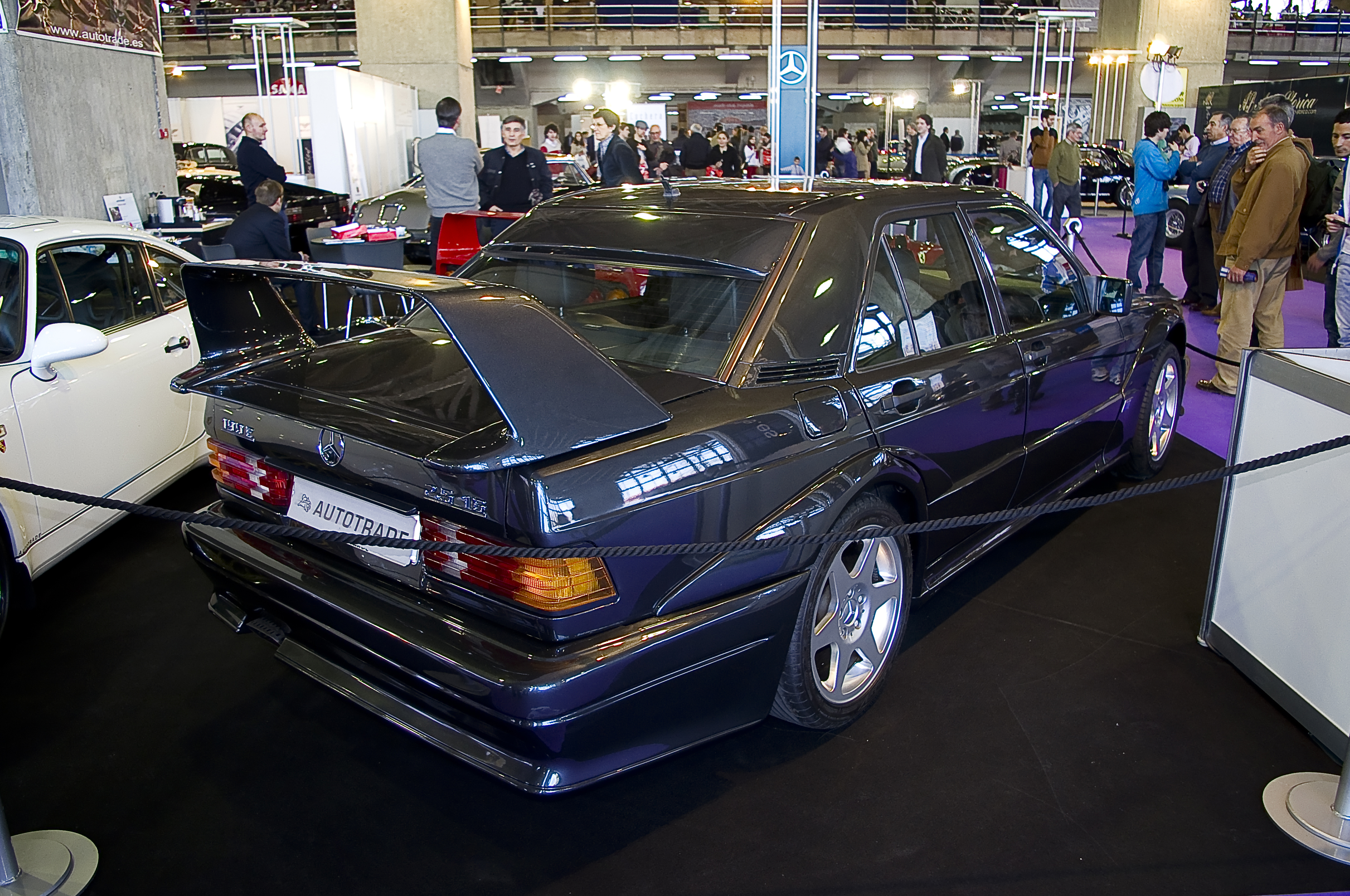 Mercedes-Benz 190 E 2.5 16v EVOLUTION II